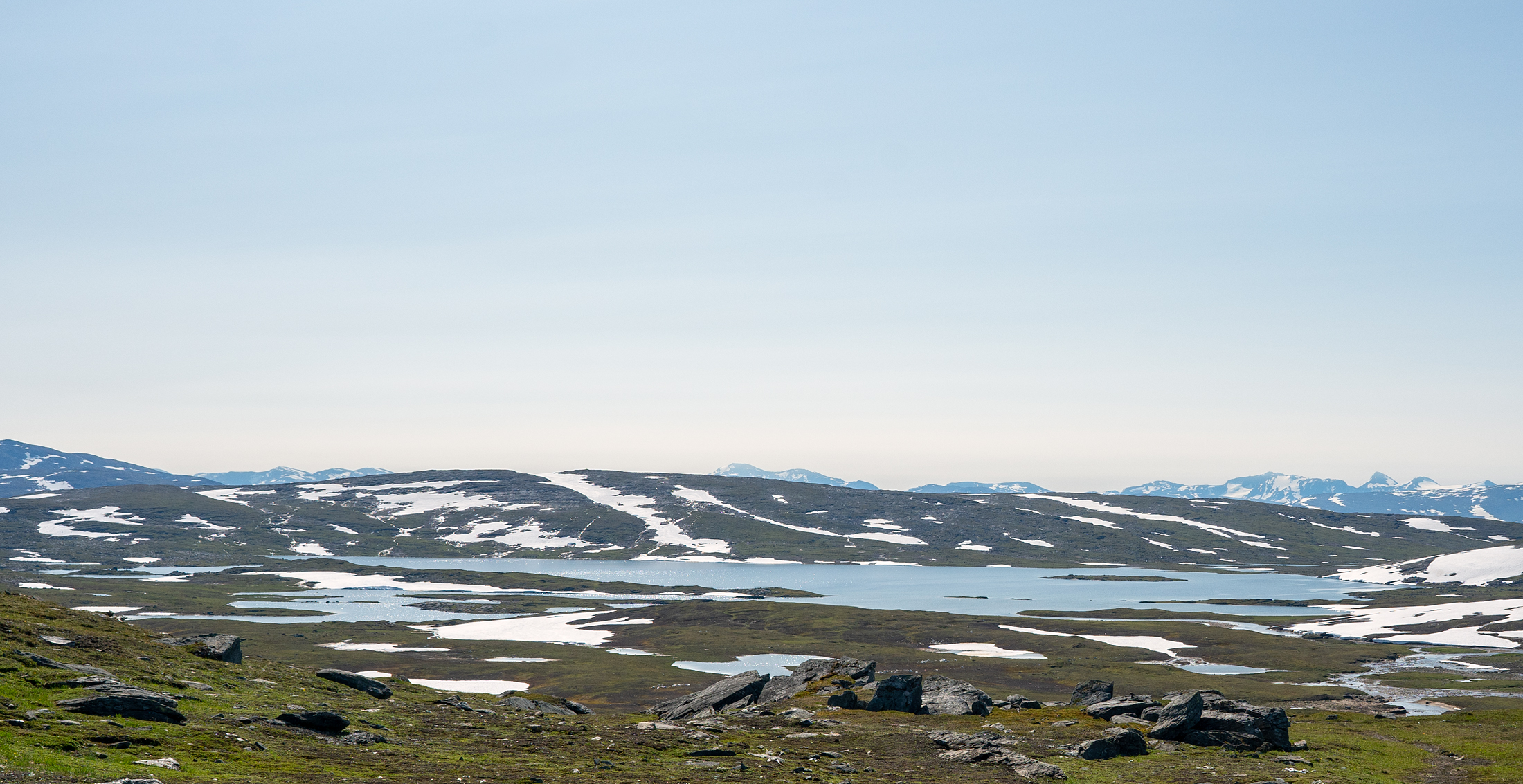 Árajávrre - vy från norr.